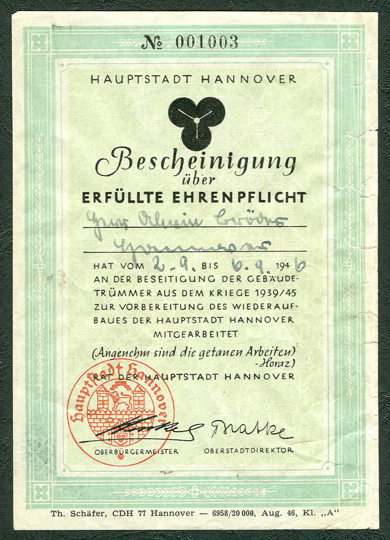 No. 001003 Bescheinigung über erfüllte Ehrenpflicht hat vom ... bis ... an der Beseitigung der Gebäudetrümmer aus dem Kriege 1939/45 zur Vorbereitung des Wiederaufbaues der Hauptstadt Hannover mitgearbeitet. (Angenehm sind die getanen Arbeiten - Horaz) Rat der Hauptstadt Hannover Oberbürgermeister Oberstadtdirektor Henkel Bratke Th. Schäfer, CDH 77 Hannover - 6958/20000, Aug. 46, Kl. A